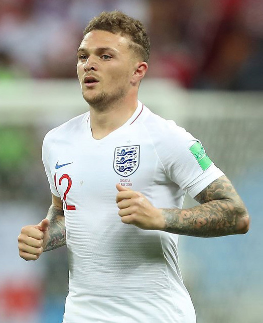 Сборная Хорватии оставила за бортом финала ЧМ-2018 команду Англии